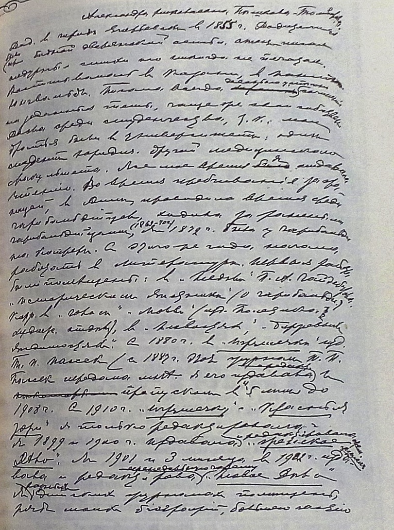 Рукопись автобиографии А. Н. Толиверовой для С. А. Венгерова